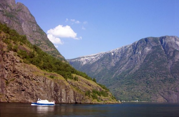 Nærøyfjord in Norway